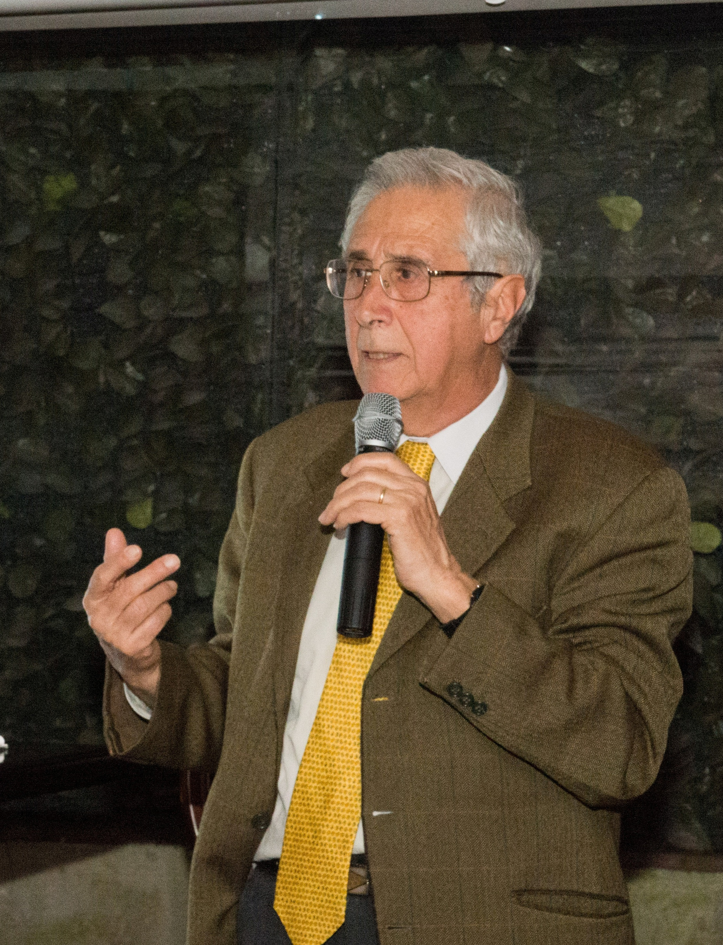 Prof. Nicola Acocella al Think Tank "Trinità dei Monti",lunedì 8 aprile 2013